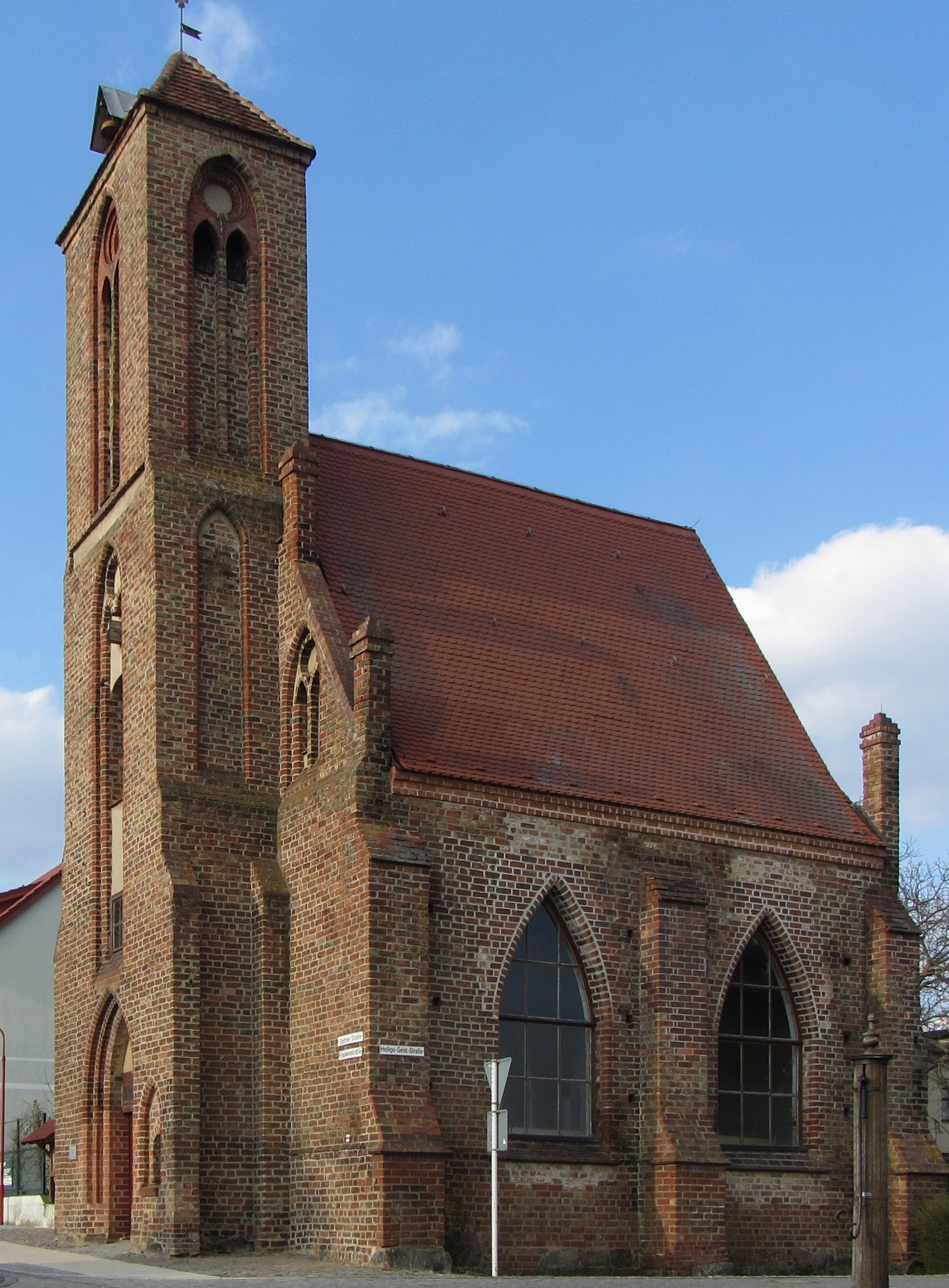 Aufnahme Gartzer Heilig Geist Spital